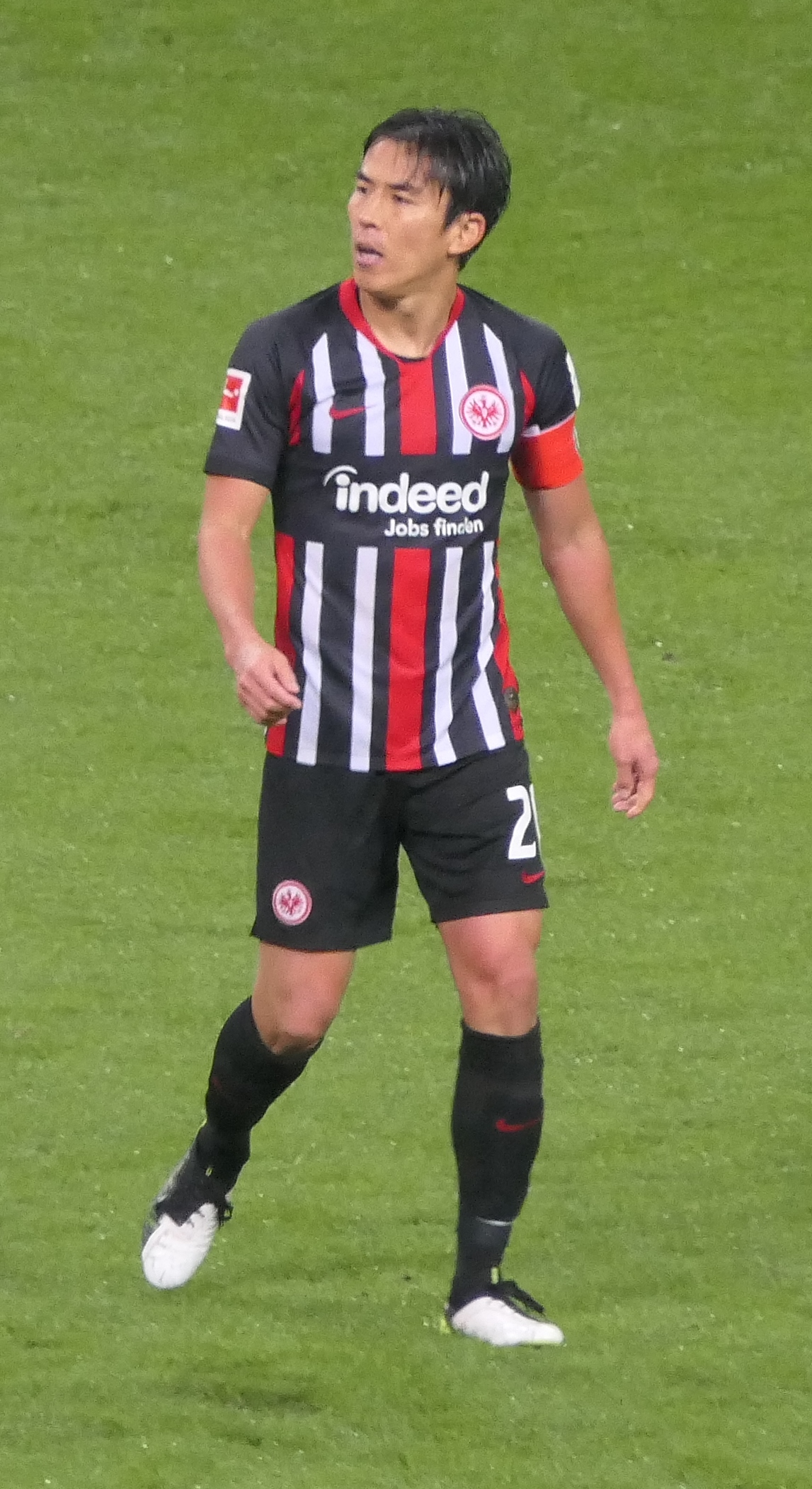 Der Fussballprofi Makoto Hasebe im Trikot von Eintracht Frankfurt beim Heimspiel gegen den SV Werder Bremen am 06.10.2019.